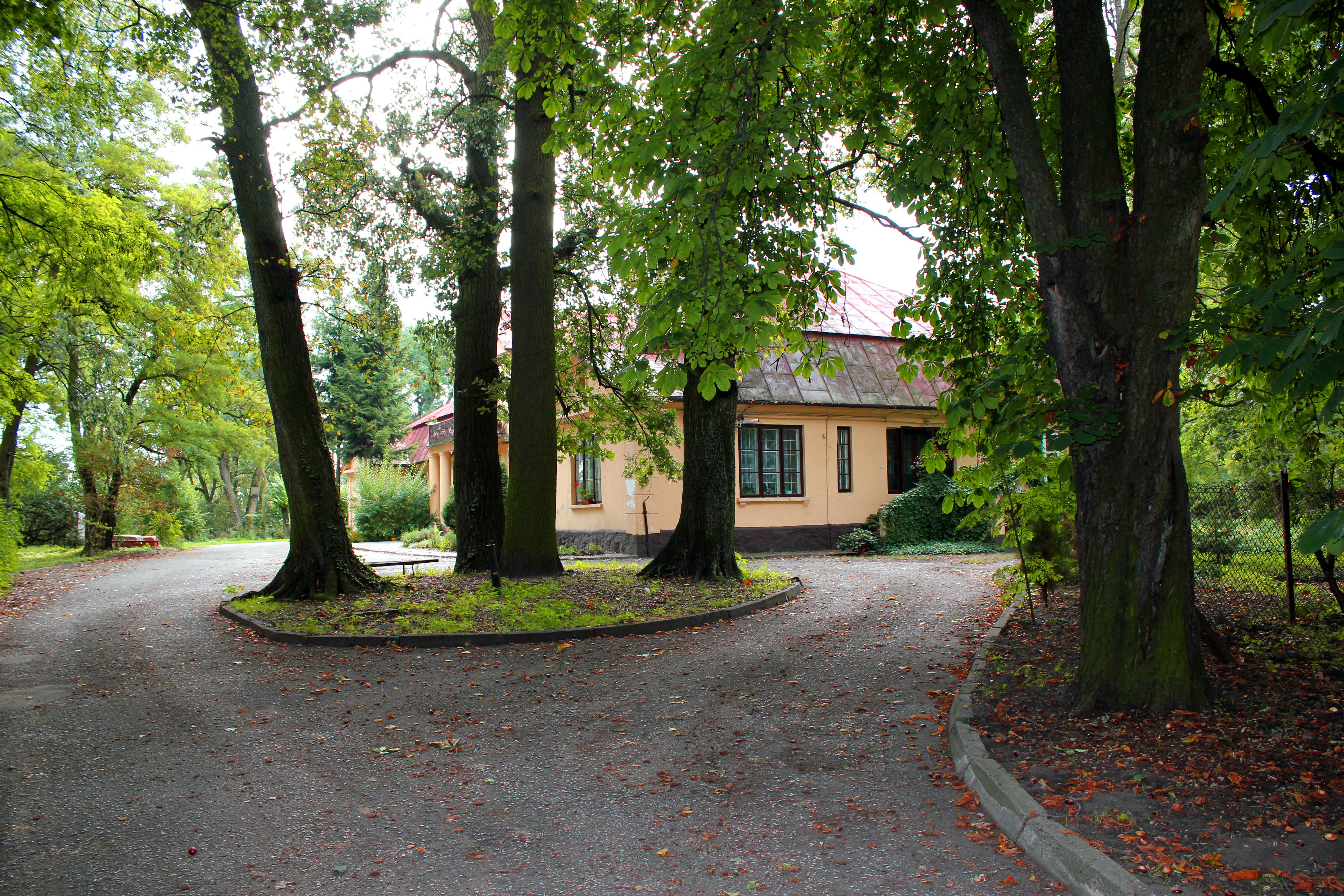 Płowce - zespół dworski: dwór, 1759, ok. 1860; park, XVIII